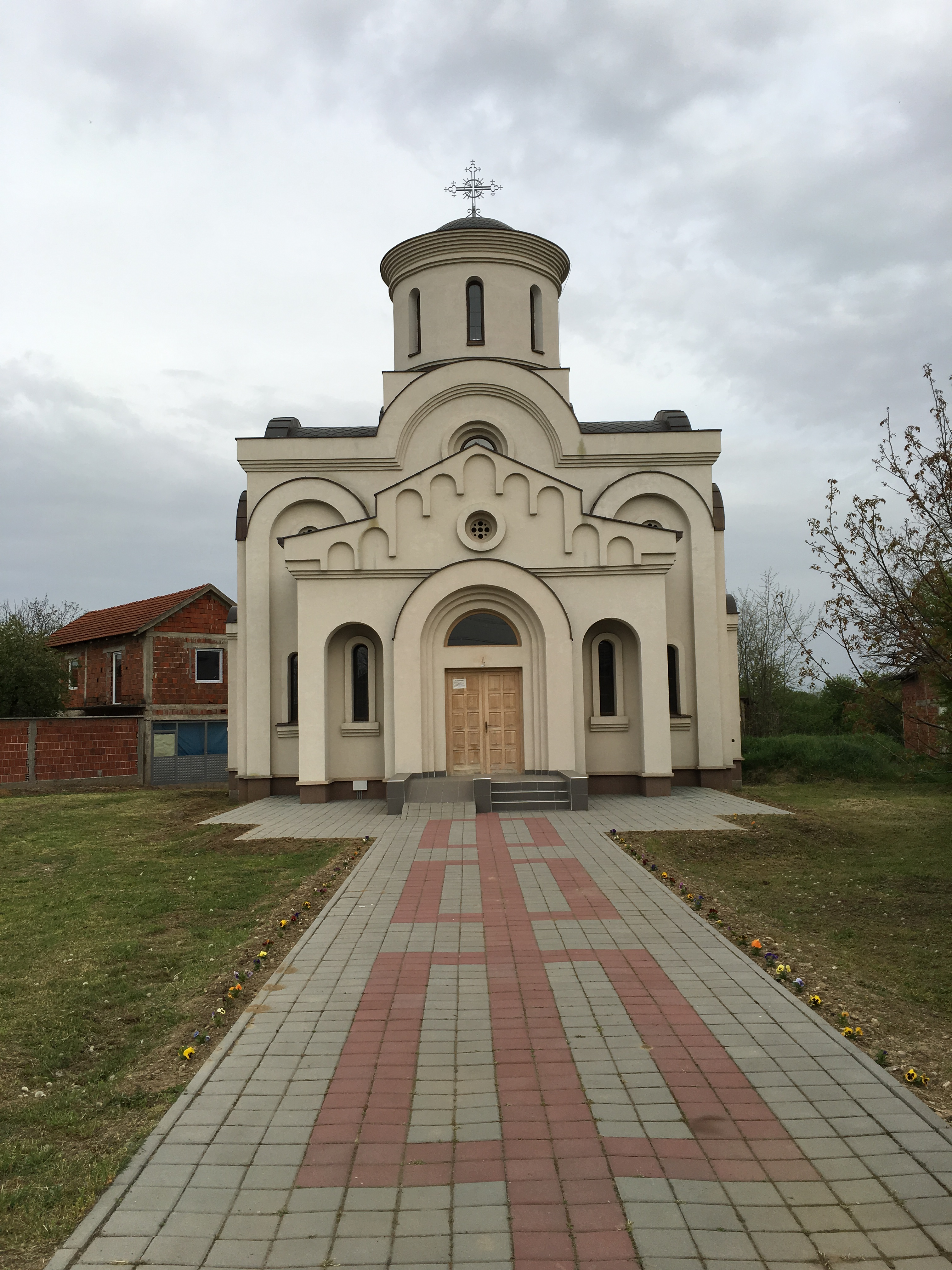 Srpski (latinica): Crkva Svetog Nikole, Bojnik, Leskovac